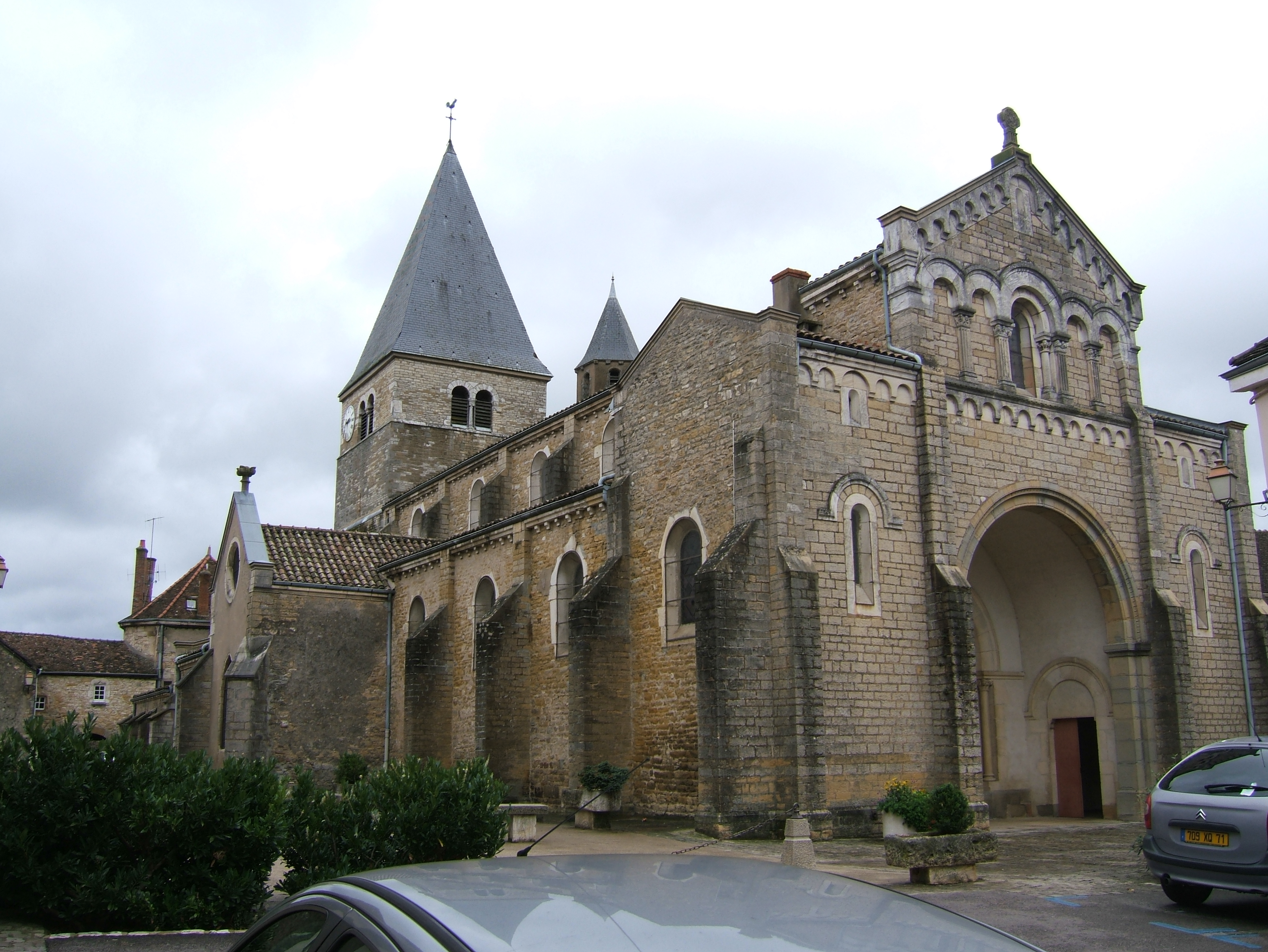 Buxy, Saint-Germain-d'Auxerre